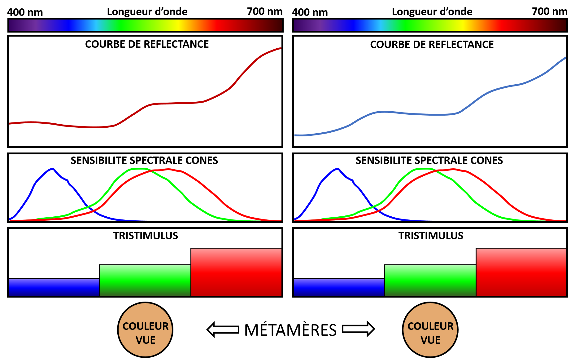 Métamérie de deux couleurs de surface, de spectre de diffusion différents, sous la même illumination blanche.